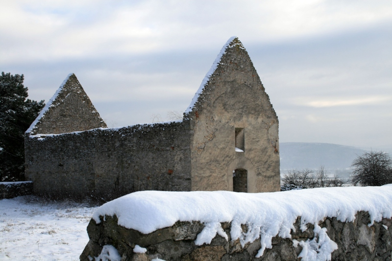 Zrúcanina románskeho kostolíka s hradiskom v Haluziciach